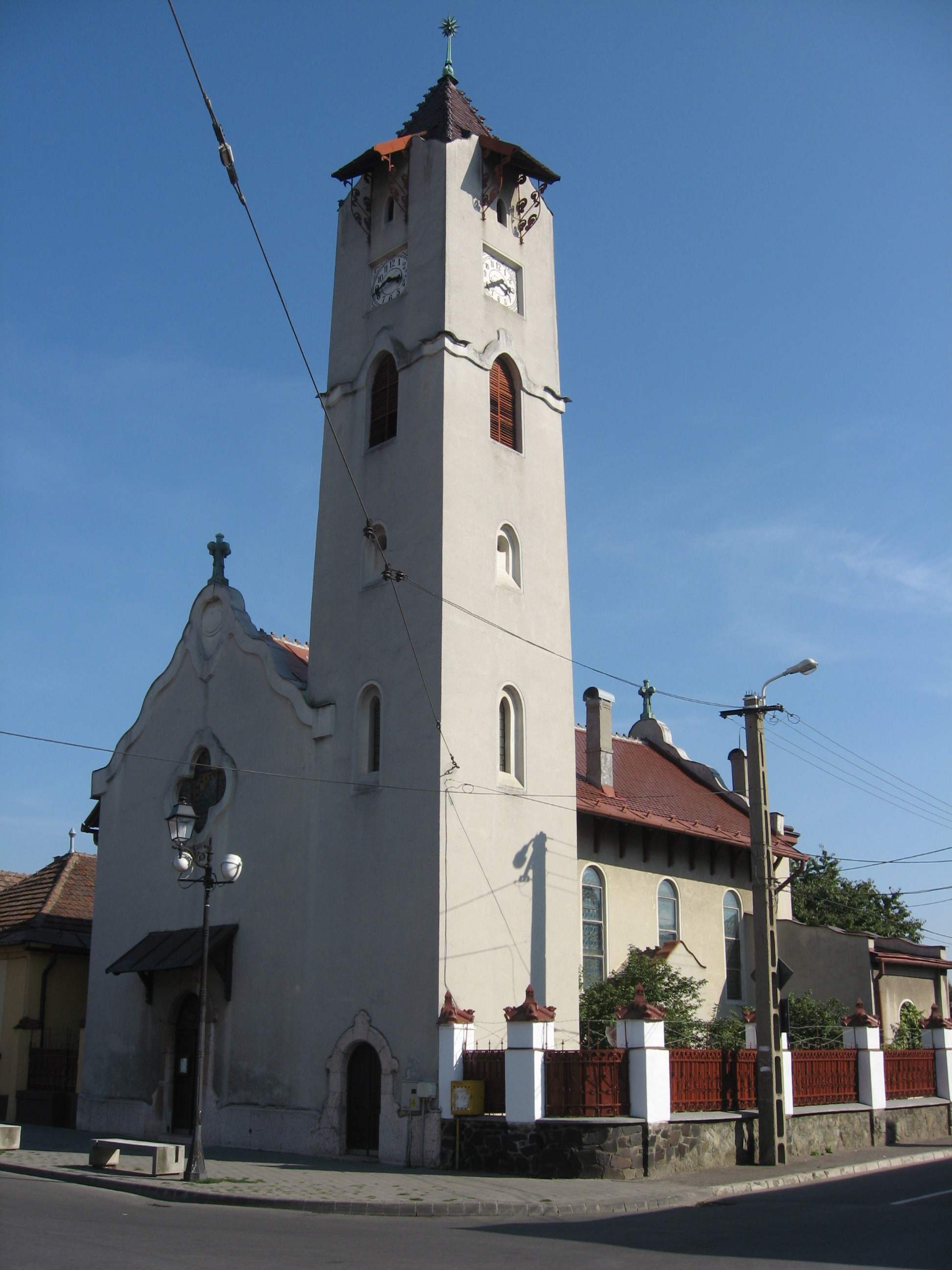 Biserica Luterana - Baia Mare